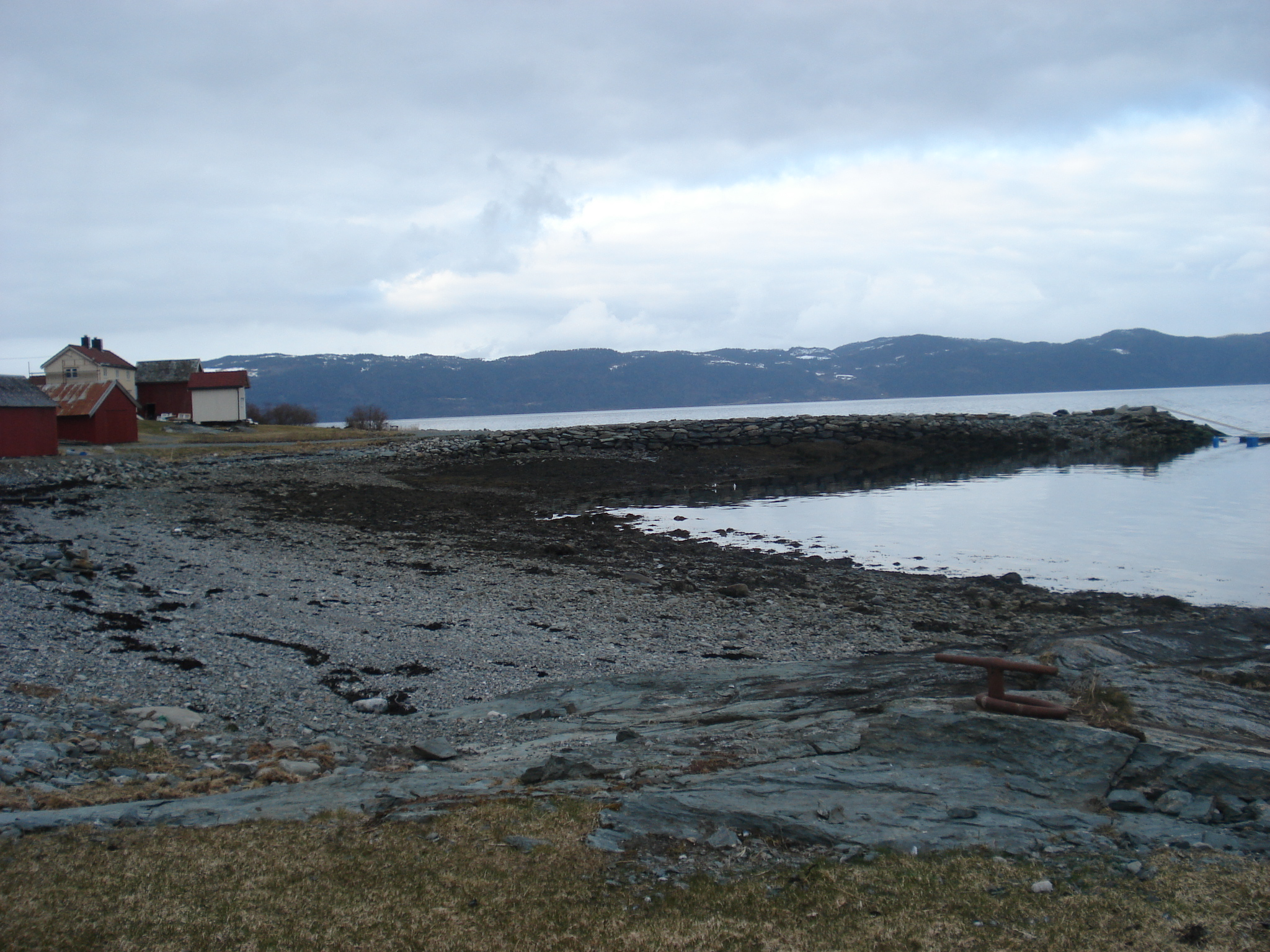 Fånestangen på Frosta der vikingehavna låg